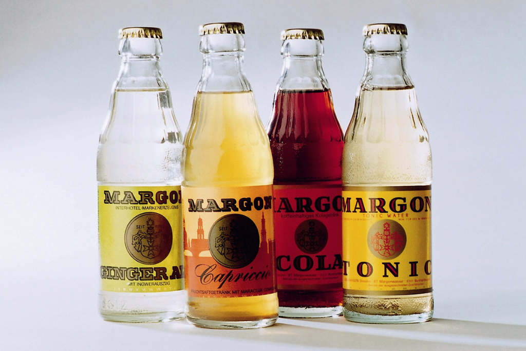 dawne butelki Margon tonic